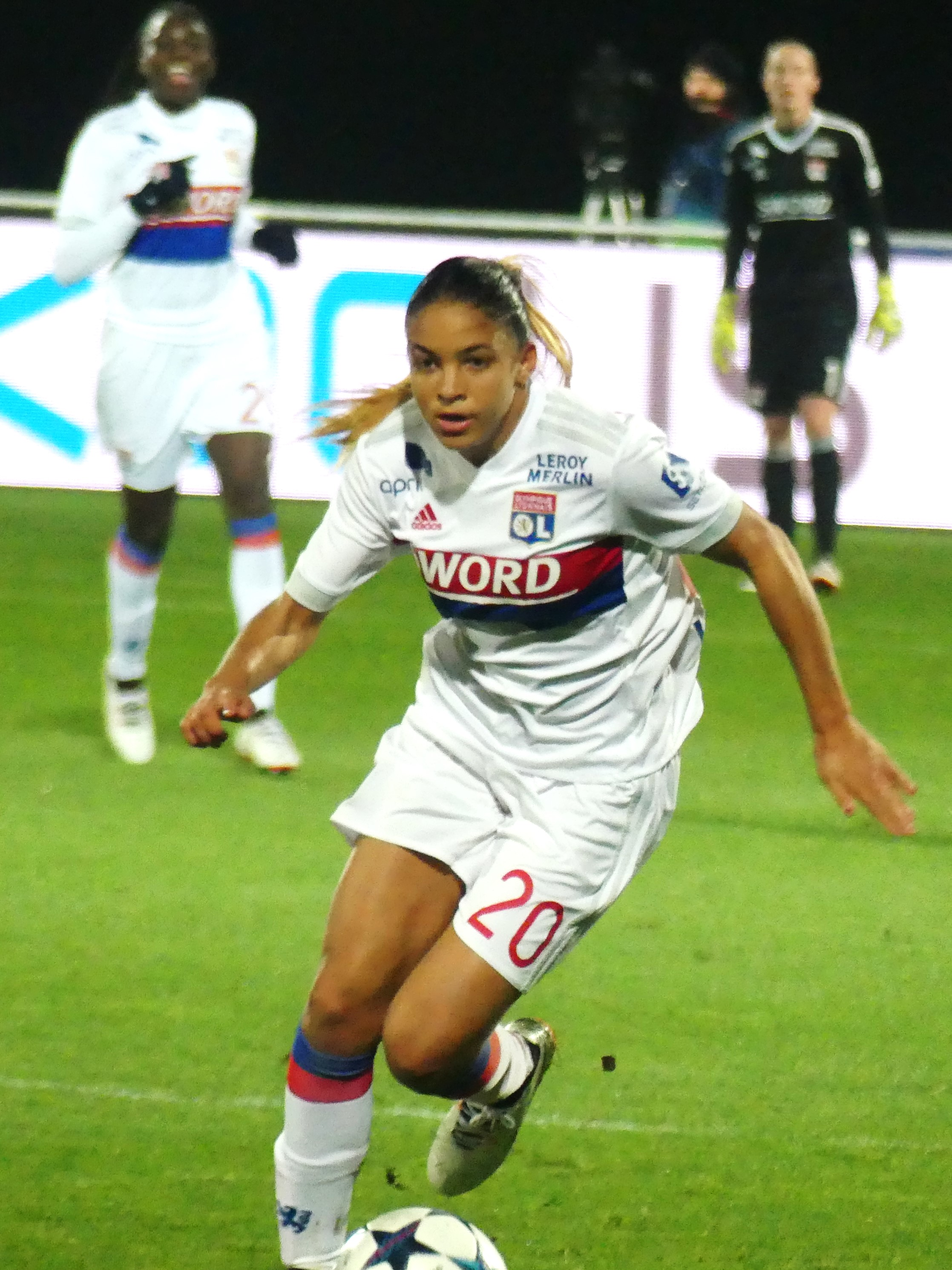 Delphine Cascarino lors du match contre BIIK Kazygurt en Ligue des Champions le 15 novembre 2017.